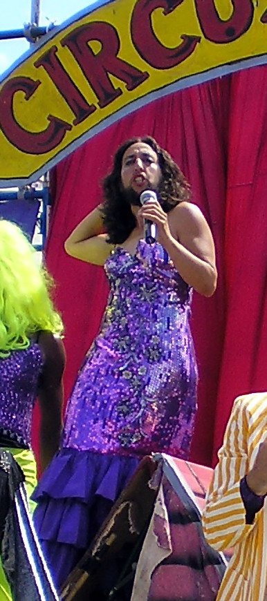 Abdel la femme à beubare